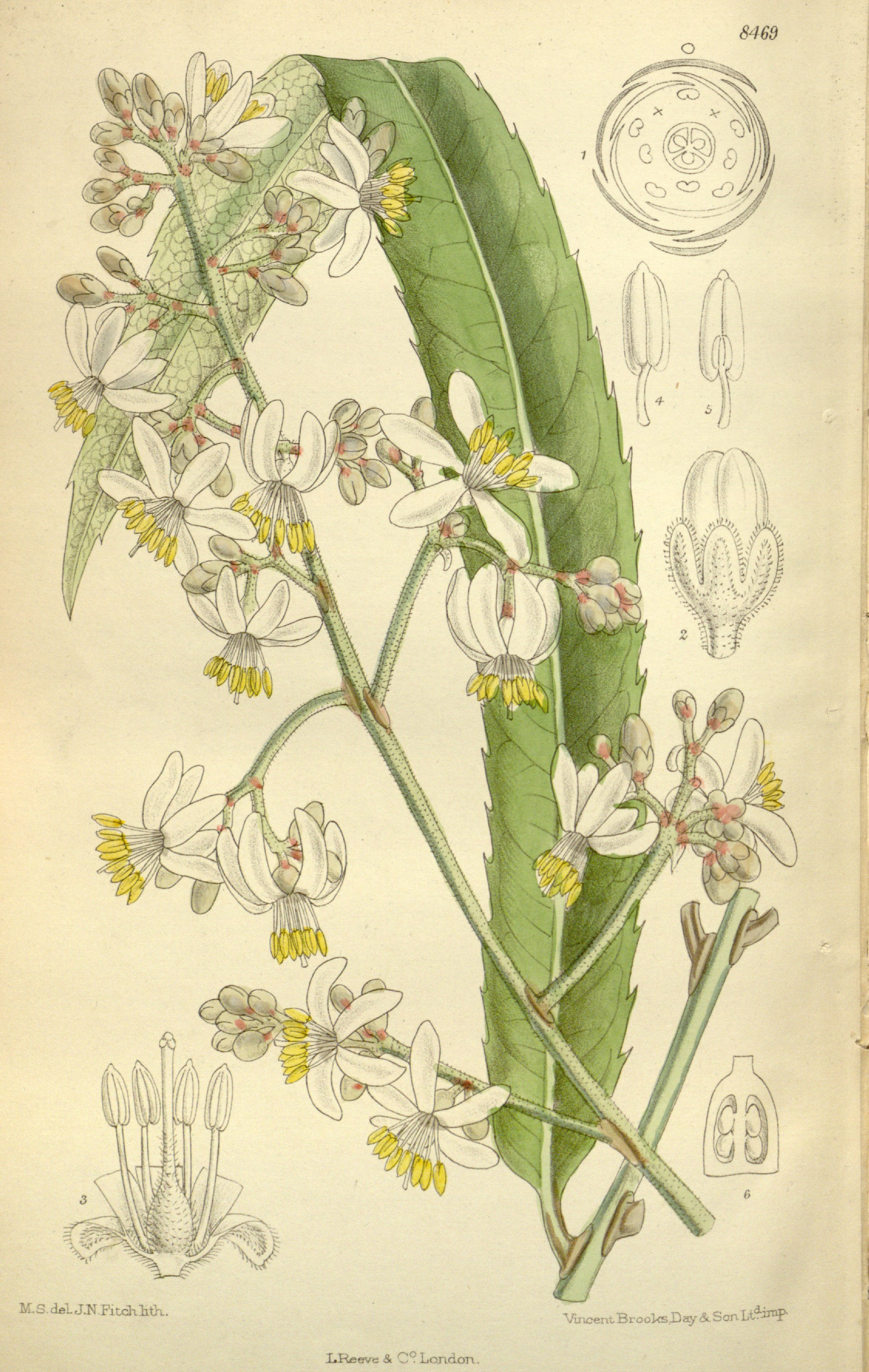 Akania hillii (= Akania bidwillii), Akaniaceae